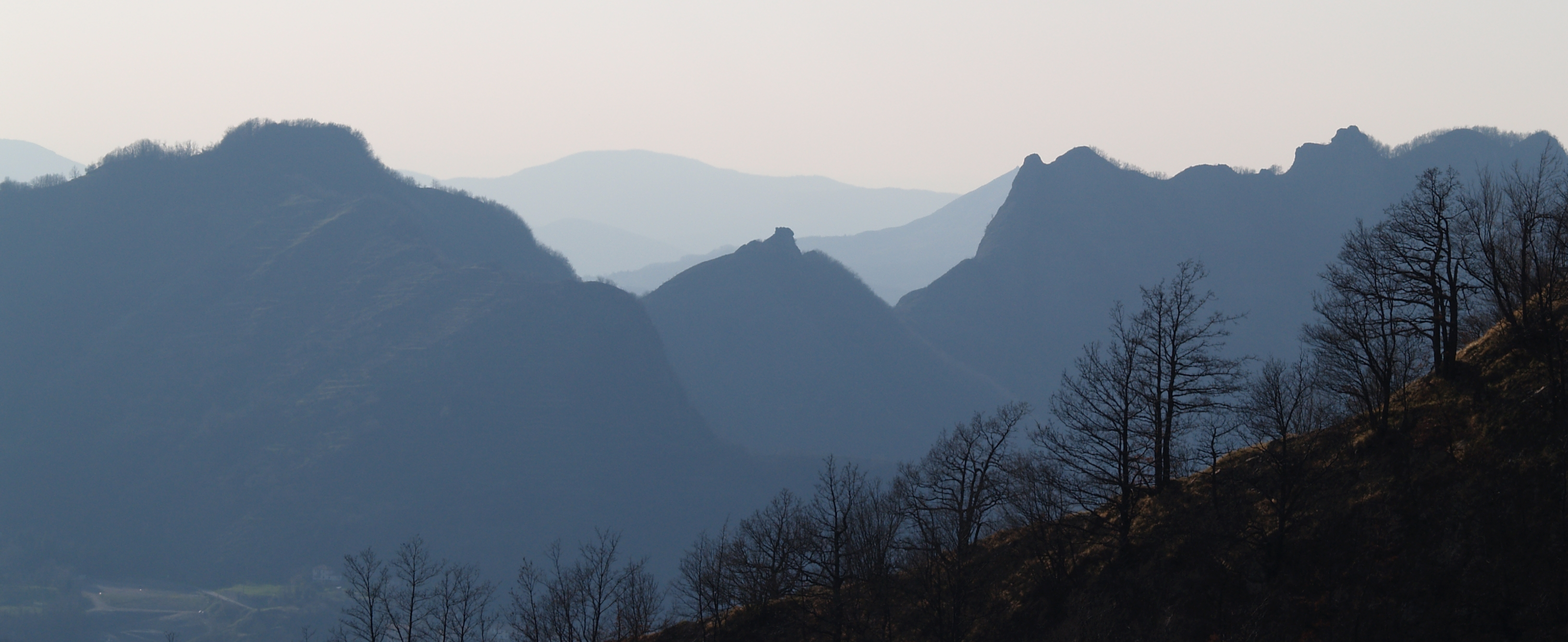 Le Rocche del Reopasso in Val Vobbia.